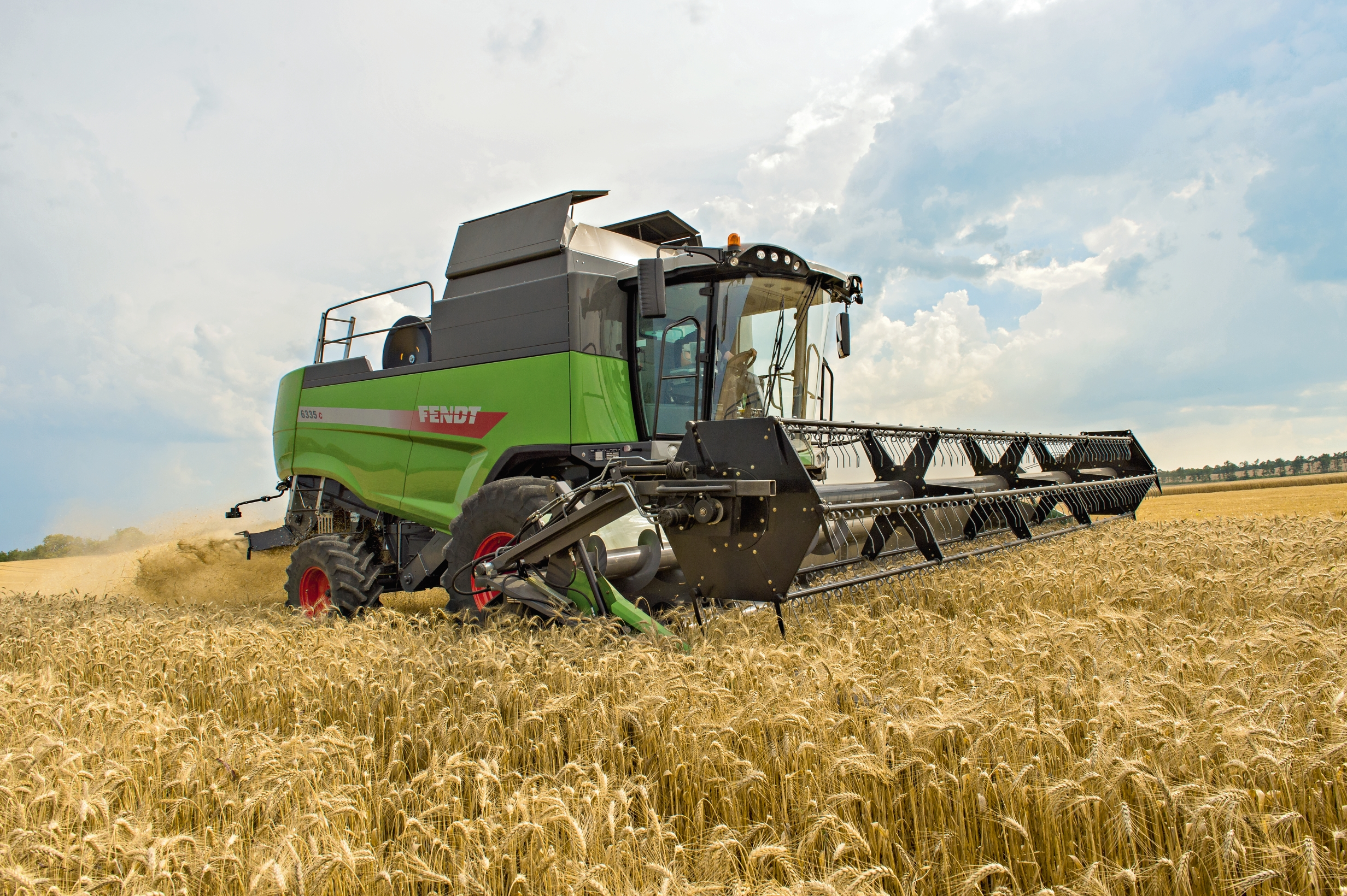 Fendt C-Serie